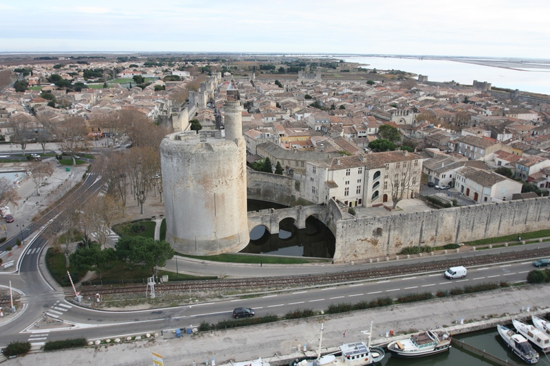 Tour de Constance à Aigues-Mortes. Photo prise par ballon captif par Paul-Louis FERRANDEZ de la société MEROPS-Photo